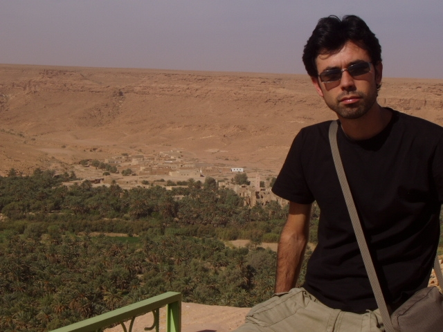 JorgeMagano